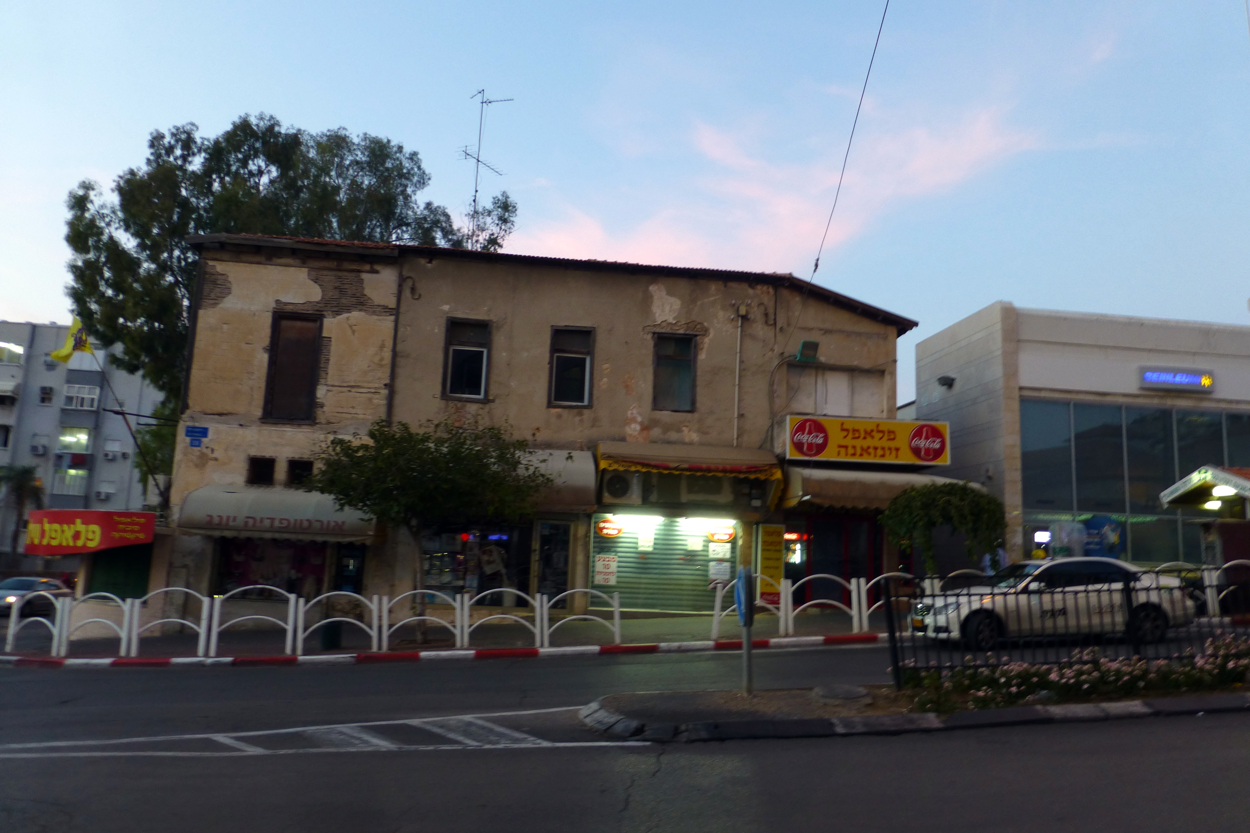 ביתו של הפקיד הראשי של הברון רוטשילד